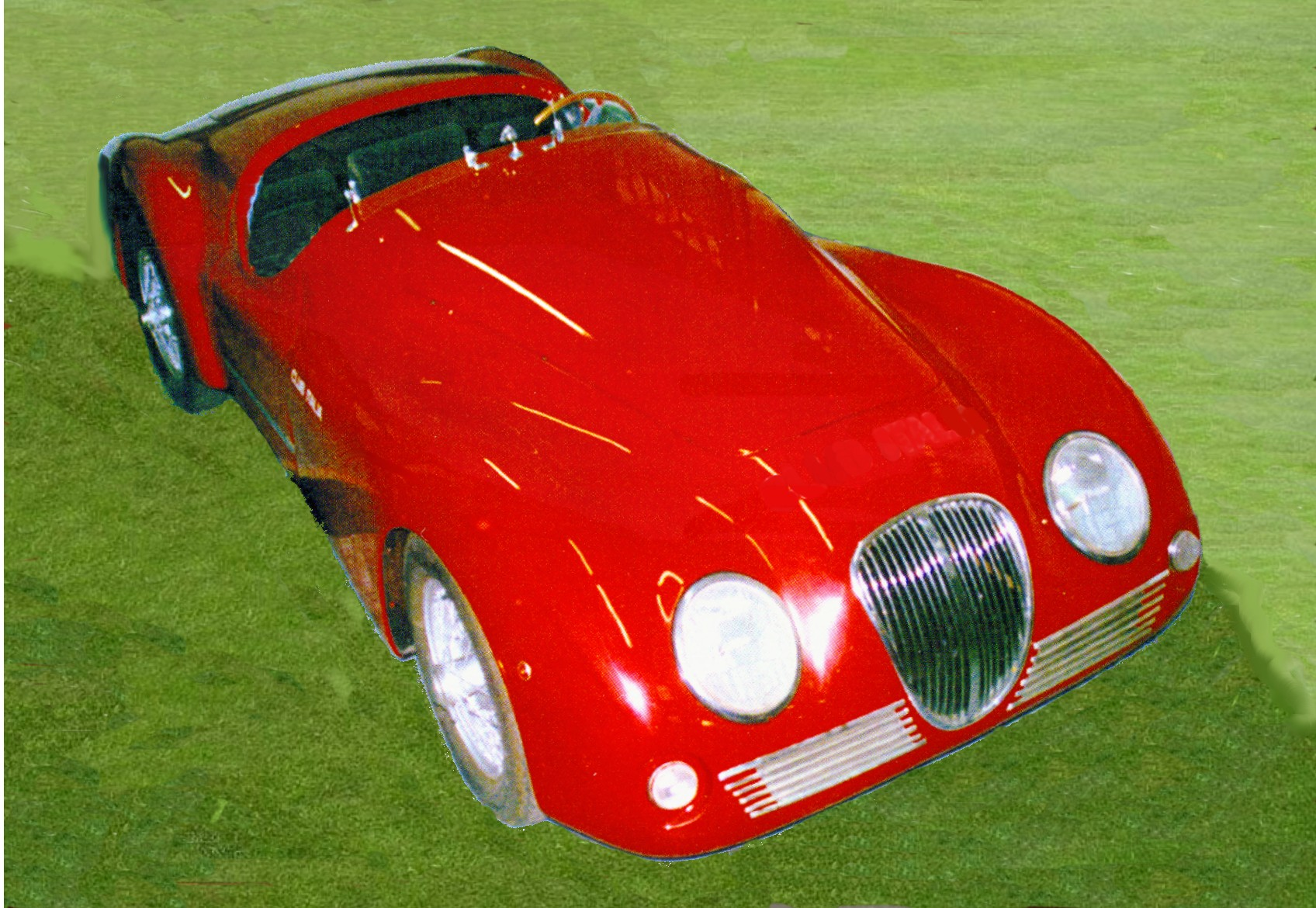 Bandini car 1100 c.c. (1946) tratto dal libro: Bandini (storia della vita e automobili di Ilario Bandini)